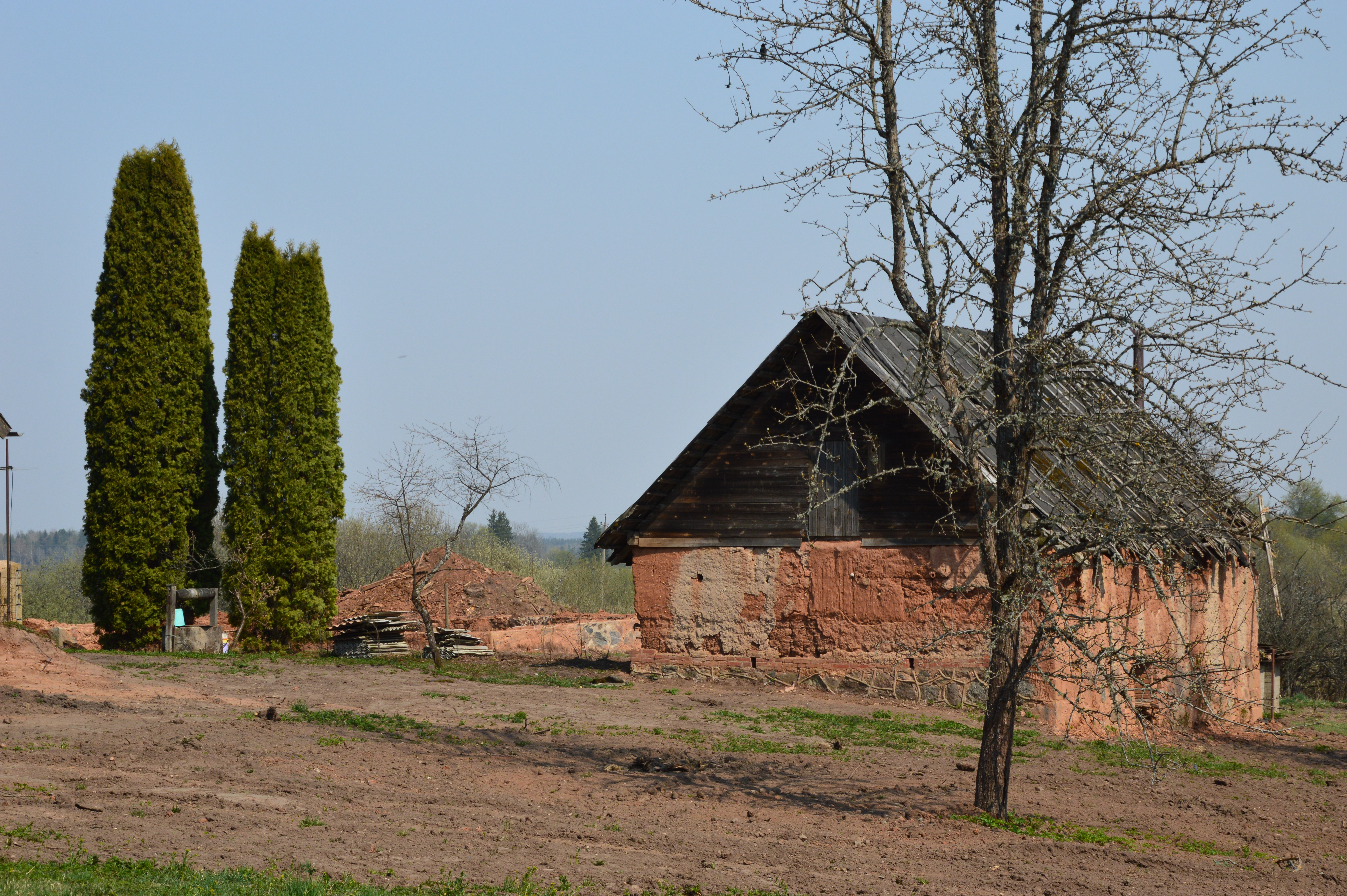 Savist hoone Rõuge vallas